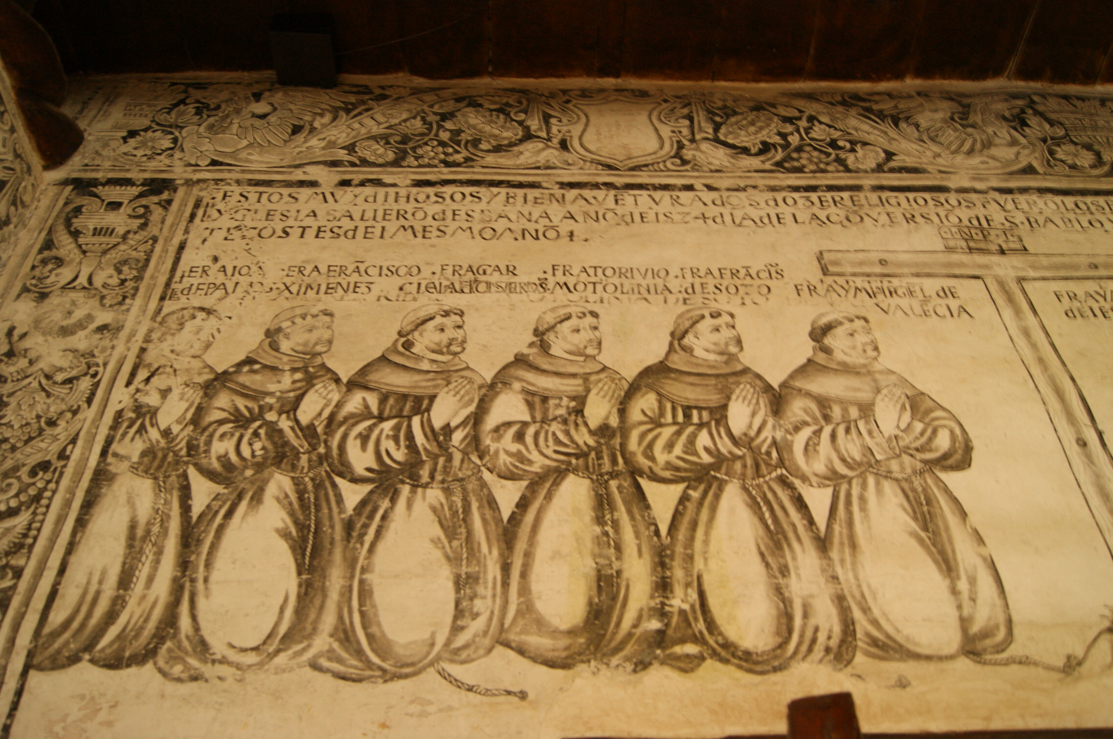 Convento de San Miguel Arcángel en Huejotzingo, Puebla